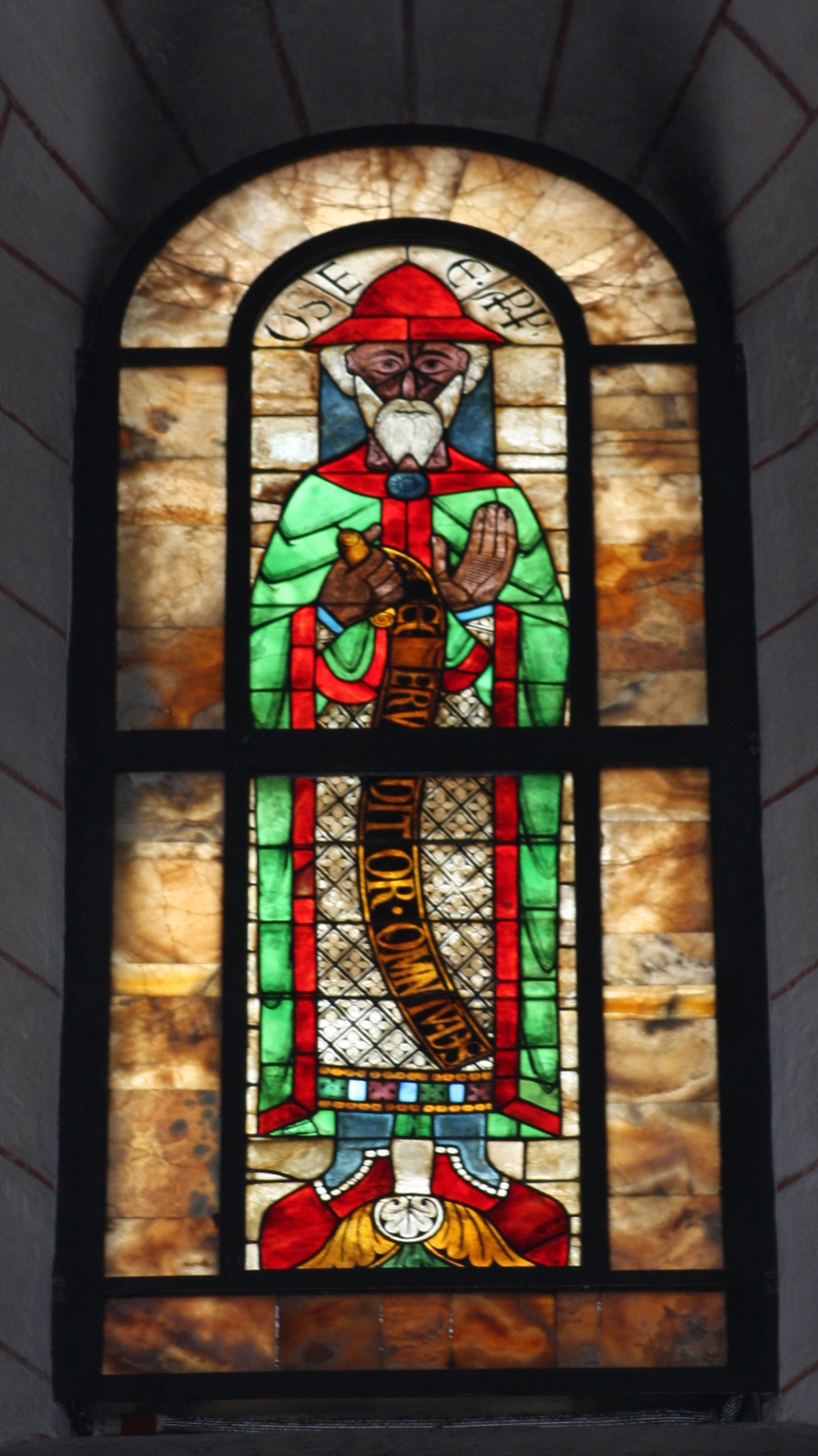 Dom Unserer Lieben Frau, Augsburg